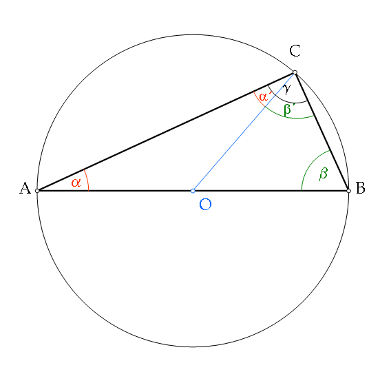 Thalész-tétel magyarázó ábrája a belső szögek összegére vonatkozó tételt felhasználó bizonyításhoz